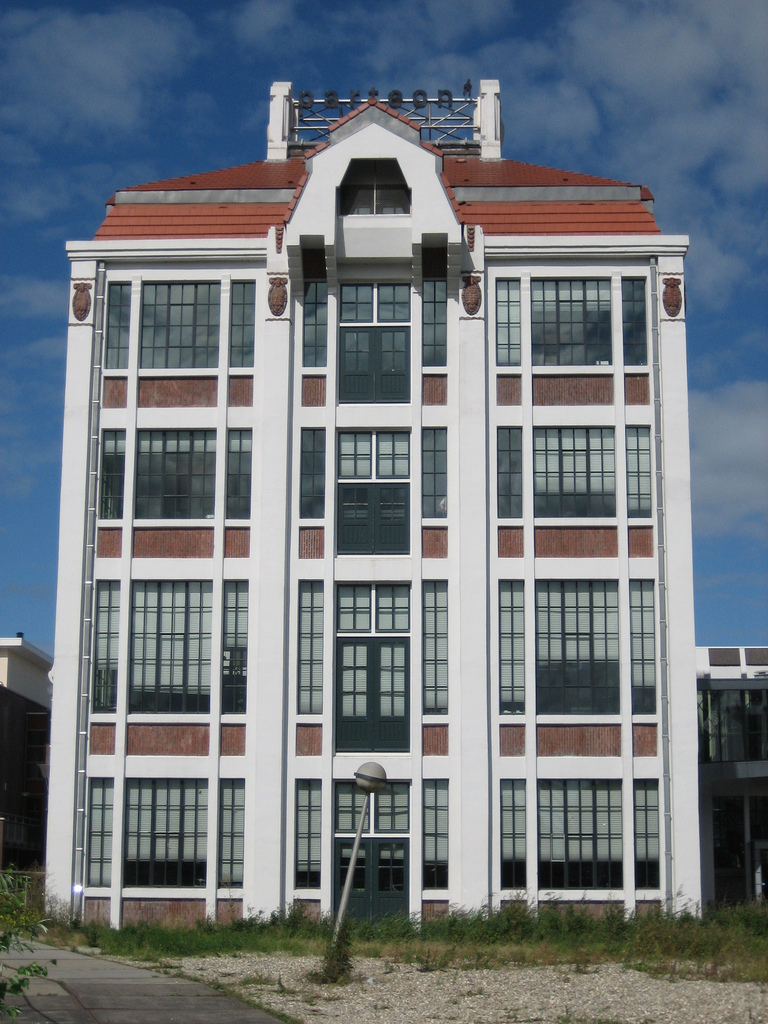 506275 De Arend Pette Boon Wormerveer